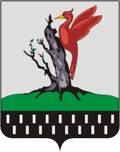 Герб Елабужского района, Татарстан